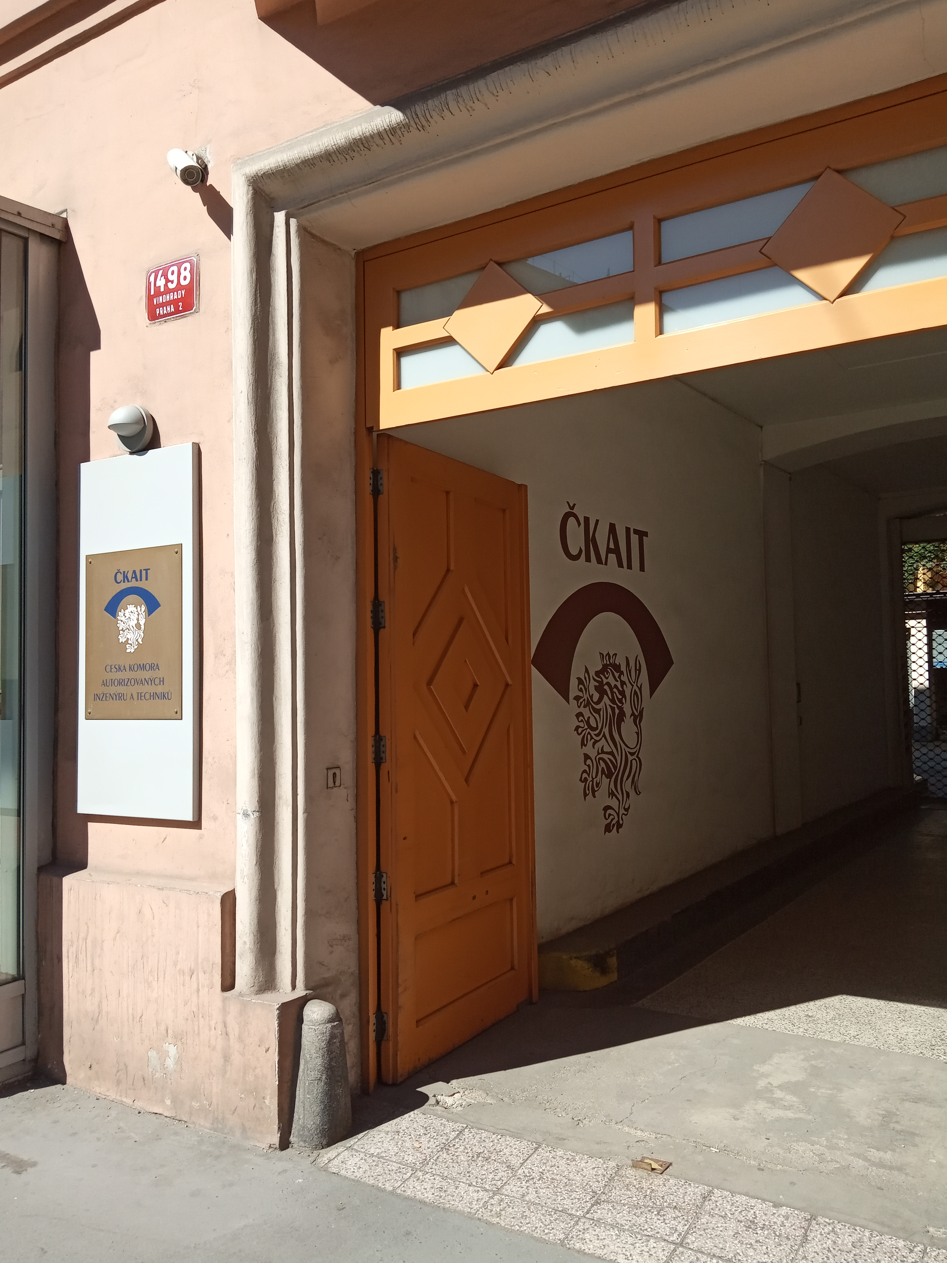 Praha - Nové Město, Sokolská 15, ČKAIT